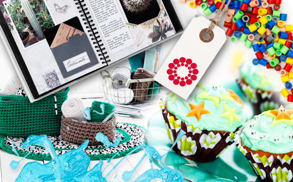 Panduros sortiment innehåller ca 10 000 artiklar.